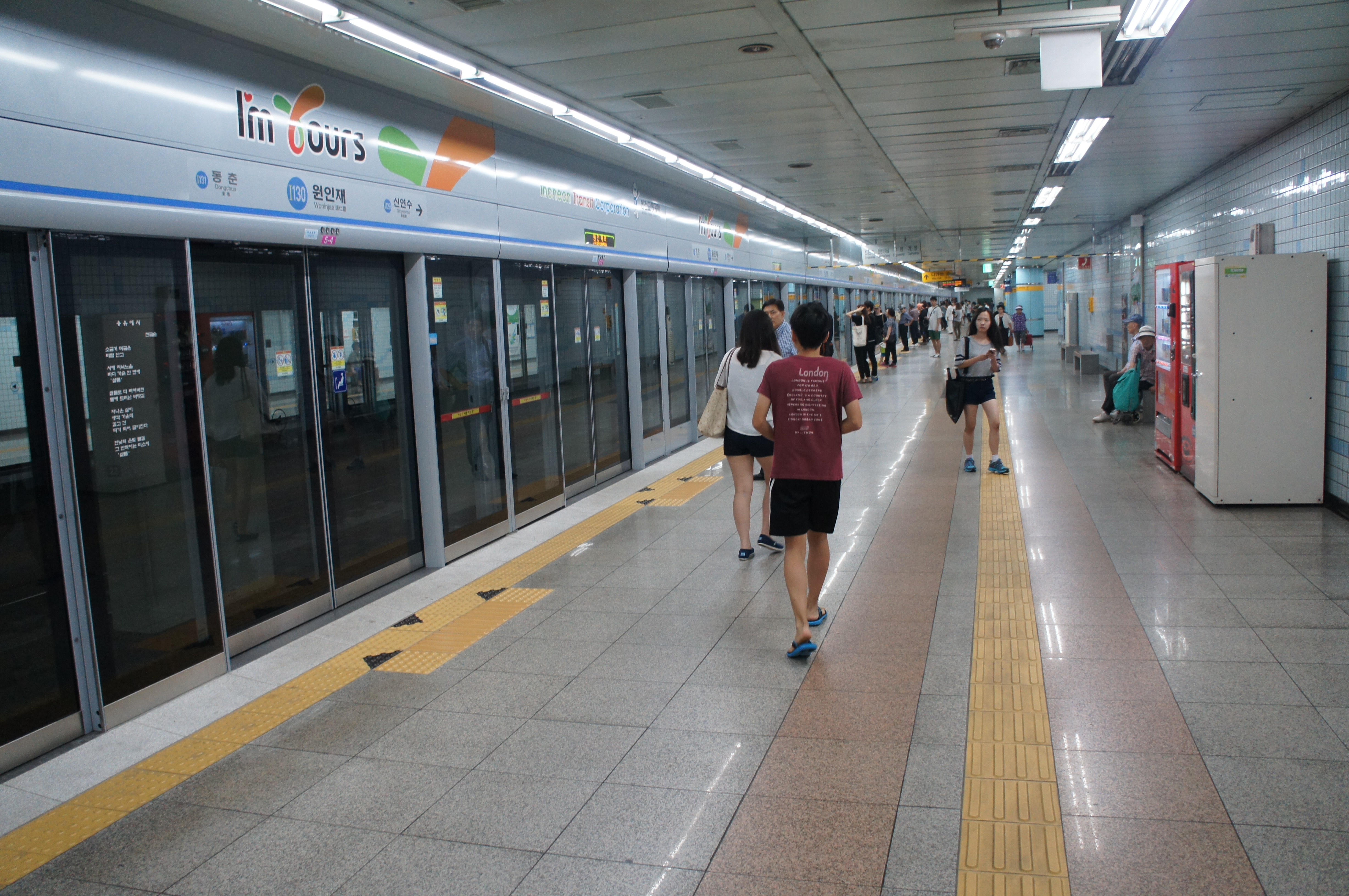 원인재역 인천1호선 승강장